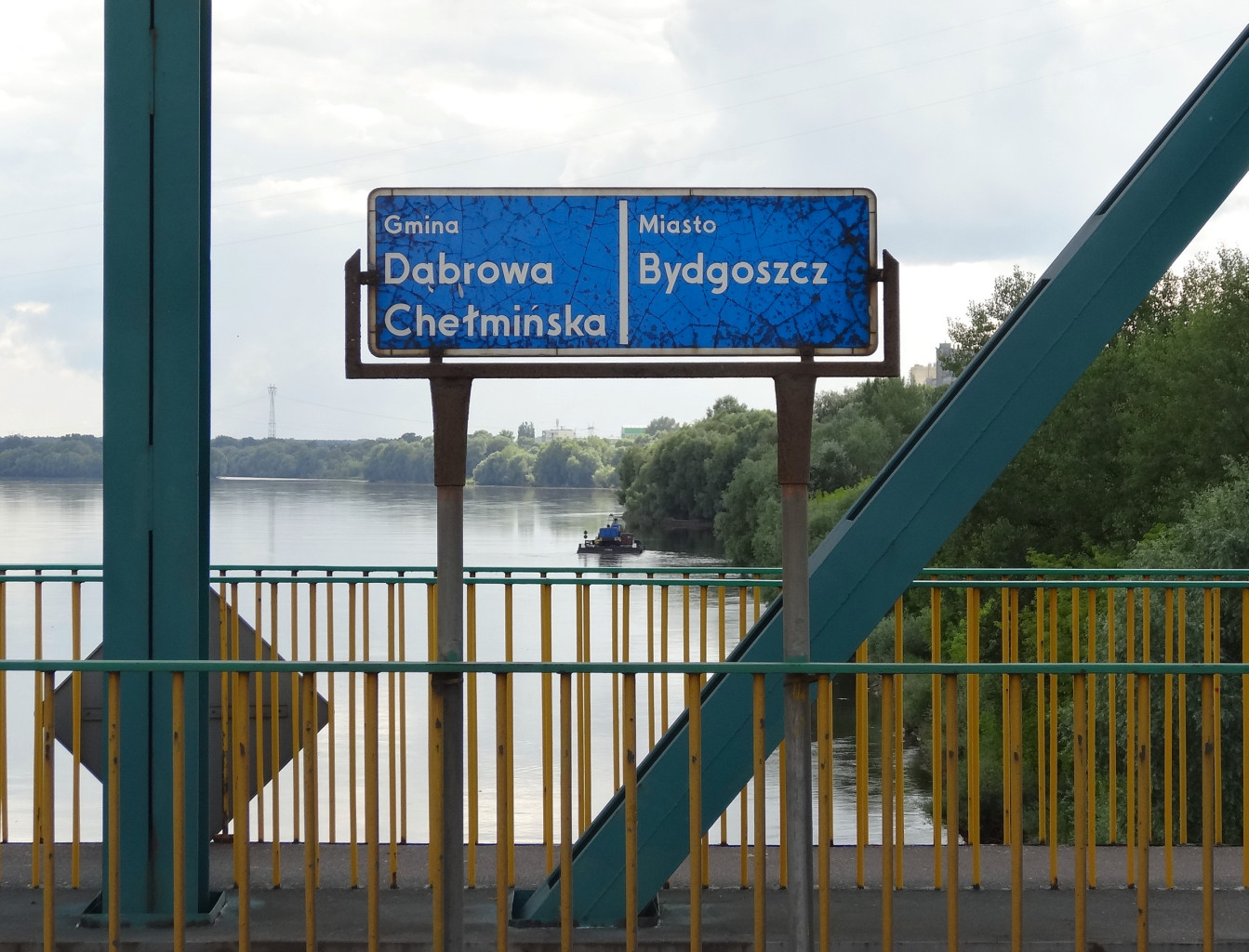 Most fordoński im. Rudolfa Modrzejewskiego nad Wisłą w Bydgoszczy-Fordonie. Tablica z oznaczeniem granicy miasta.